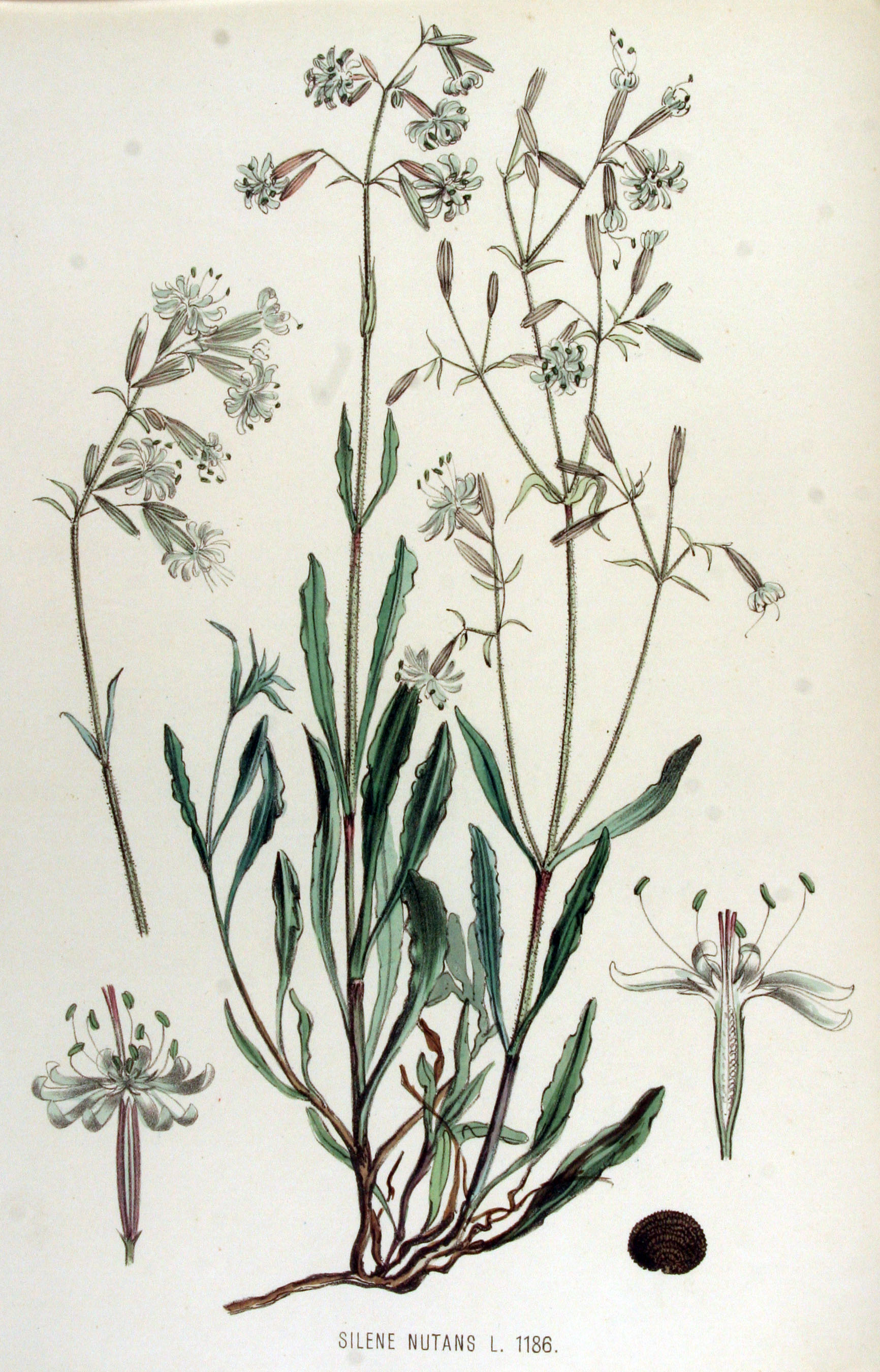 Silene nutans L.